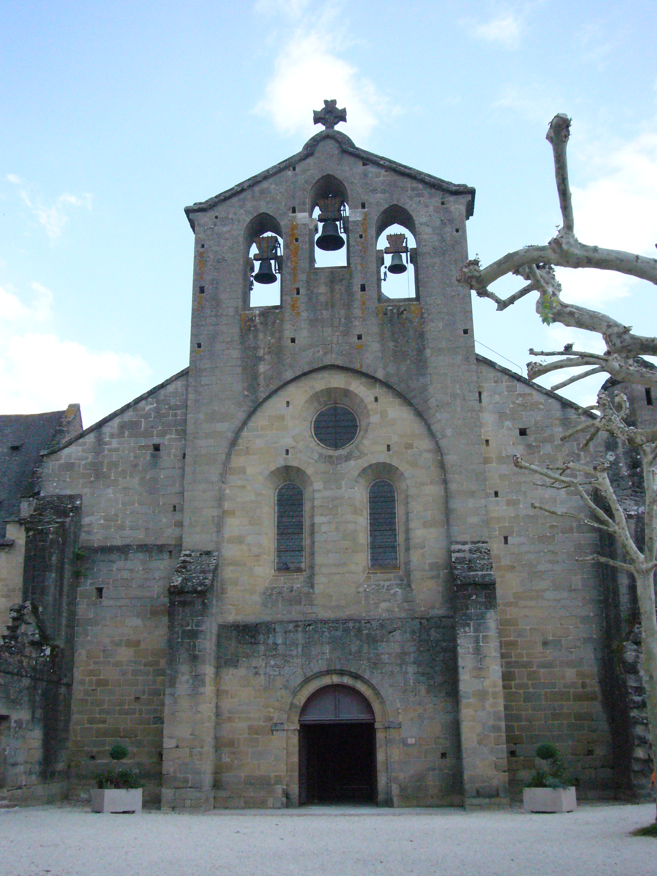 Église-abbatiale d'Aubazine, Corrèze, France